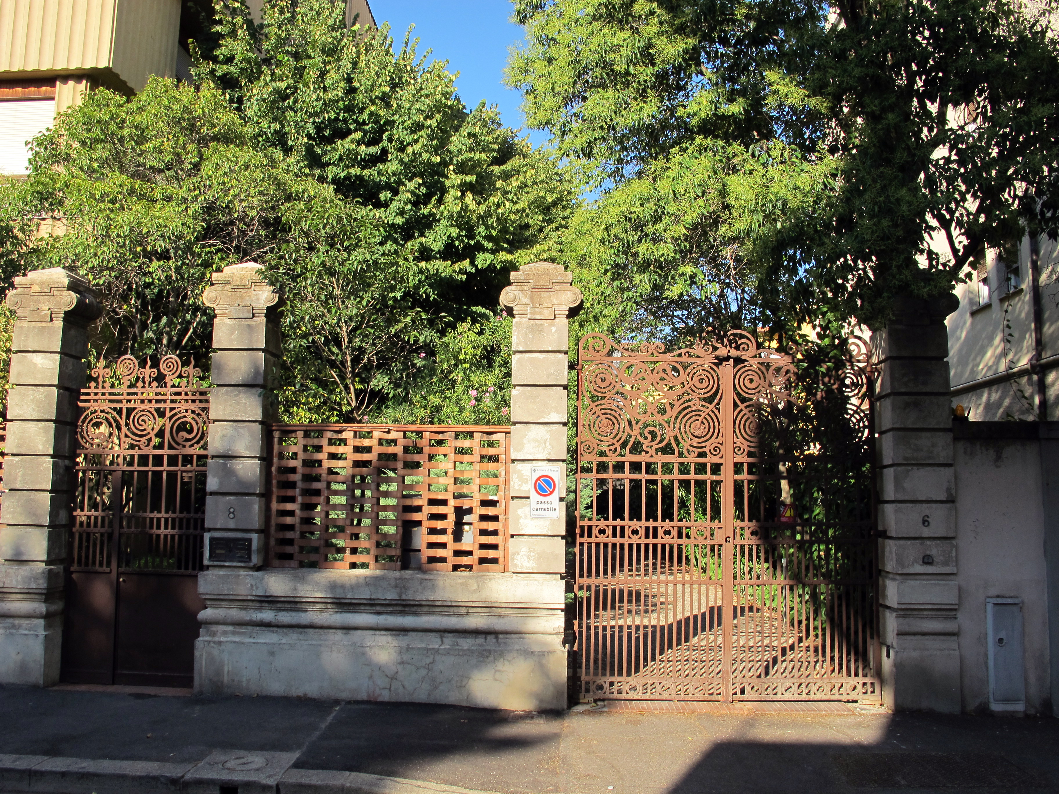 Viale Giuseppe Mazzini e dintorni, Firenze